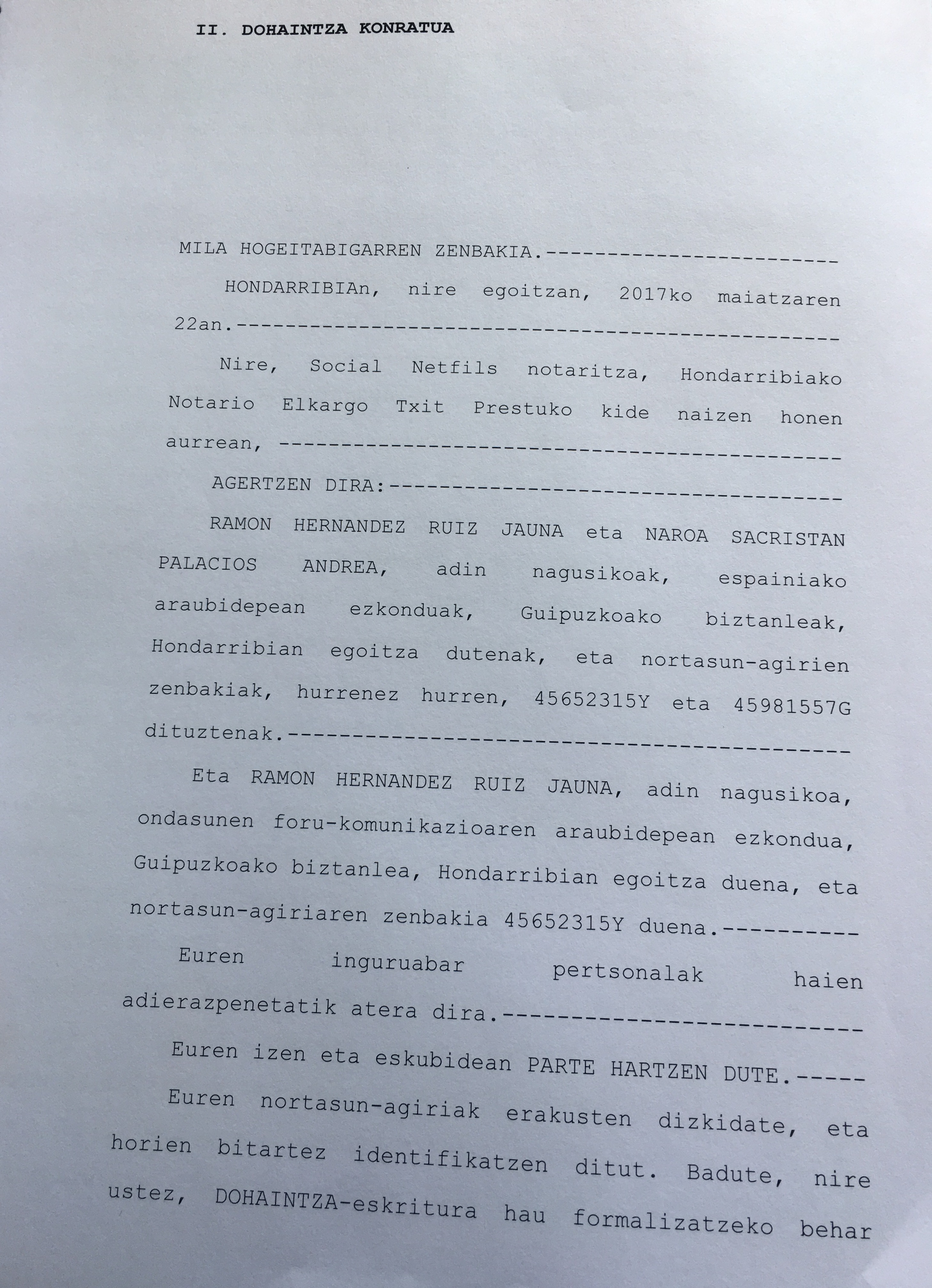 Dohaintza kontratuaren eredua fede publiko idatzia